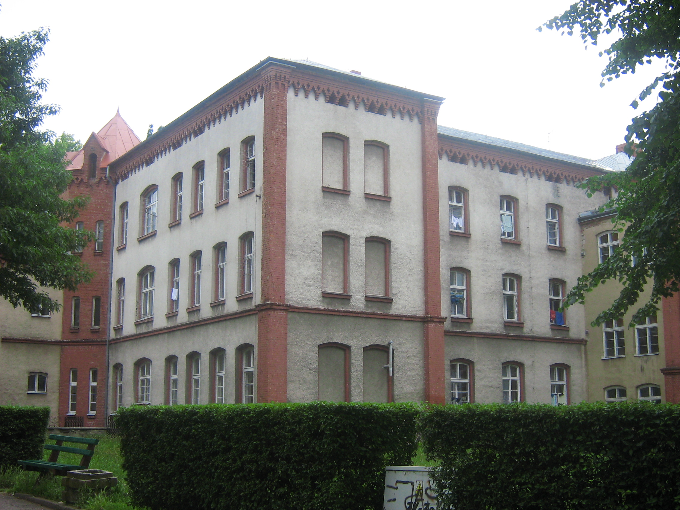 Szpital Uzdrowiskowy w Kamieniu Pomorskim; w 1945 stacjonował tu 39 pułk piechoty